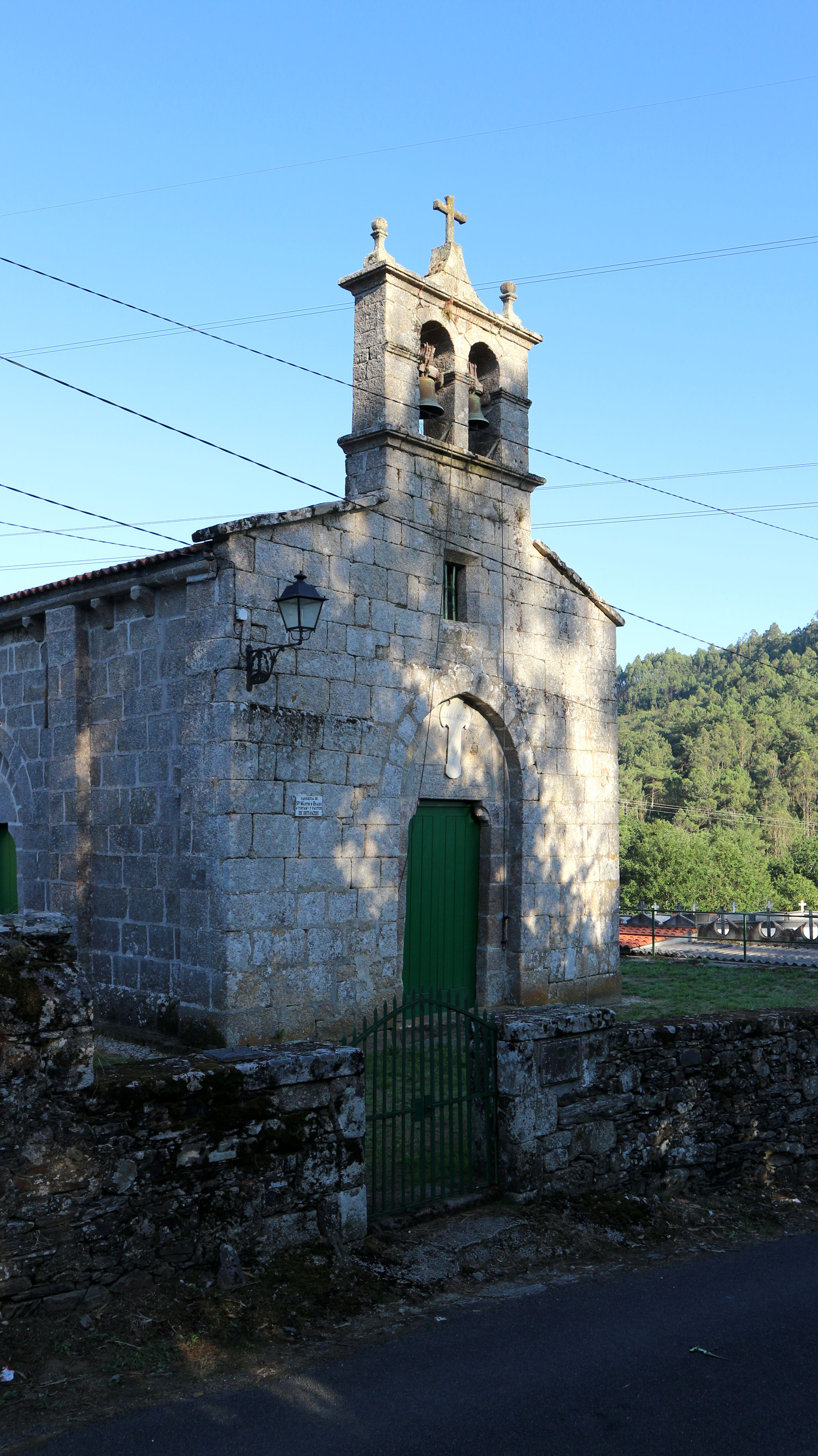 Igrexa de San Martiño de Brabío. O Martinete, Brabío, Betanzos.